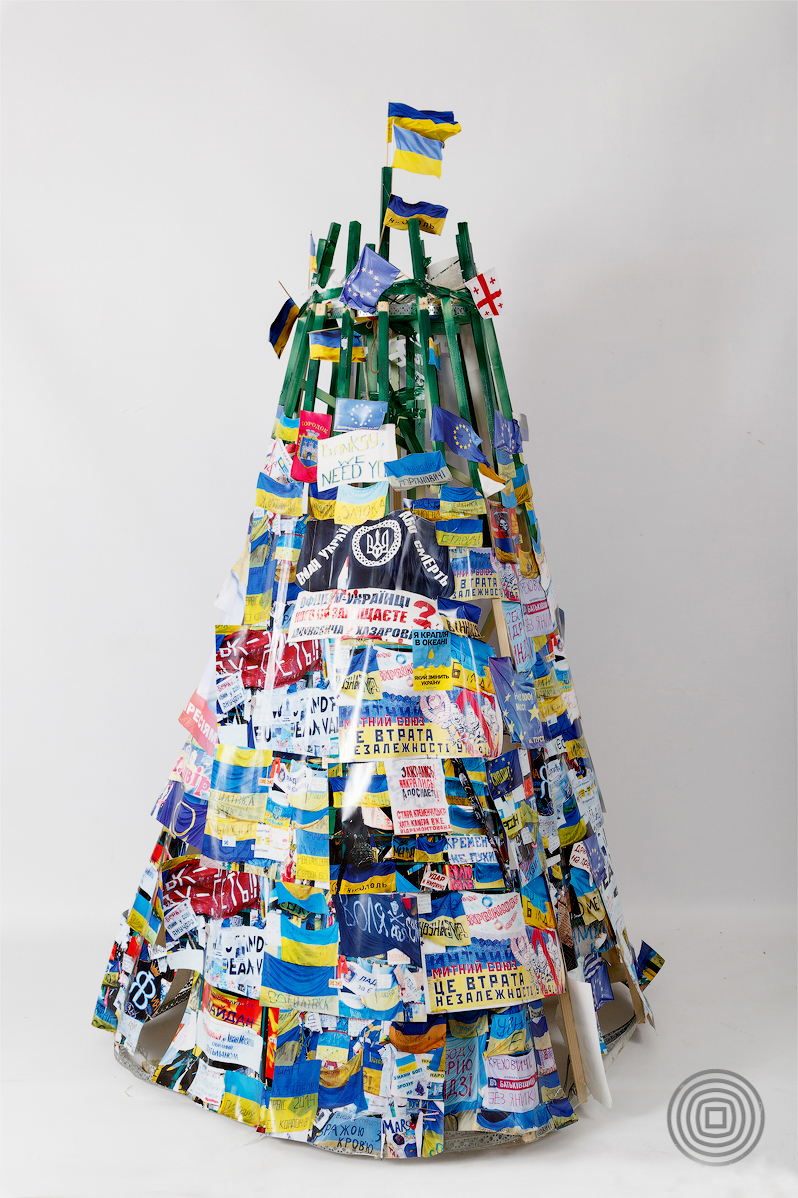 Макет «Йолки». Грудень 2013 – лютий 2014 р. Ймовірно, був зроблений співробітниками Громадського у грудні 2013 р. Став своєрідним символом каналу, оскільки під час онлайн трансляцій постійно перебував в об’єктиві відеокамери. «Йолка» - один із символів Євромайдану, адже розгін мирних протестувальників 30 листопада відбувся під приводом установлення міською владою новорічної ялинки, а віче 1 грудня почалося з її захоплення мітингувальниками. Каркас ялинки став символом незгоди з тодішнім режимом Януковича. Від початку грудня 2013 року, відколи на каркасі ялинки з’явилася перша революційна прикраса – український прапор, і до її демонтажу в середині серпня 2014 року багатотонна металева конструкція була унікальним агітаційним та мистецьким простором, де динамічно було представлено вимоги, ідеї, сподівання, емоції протестувальників.